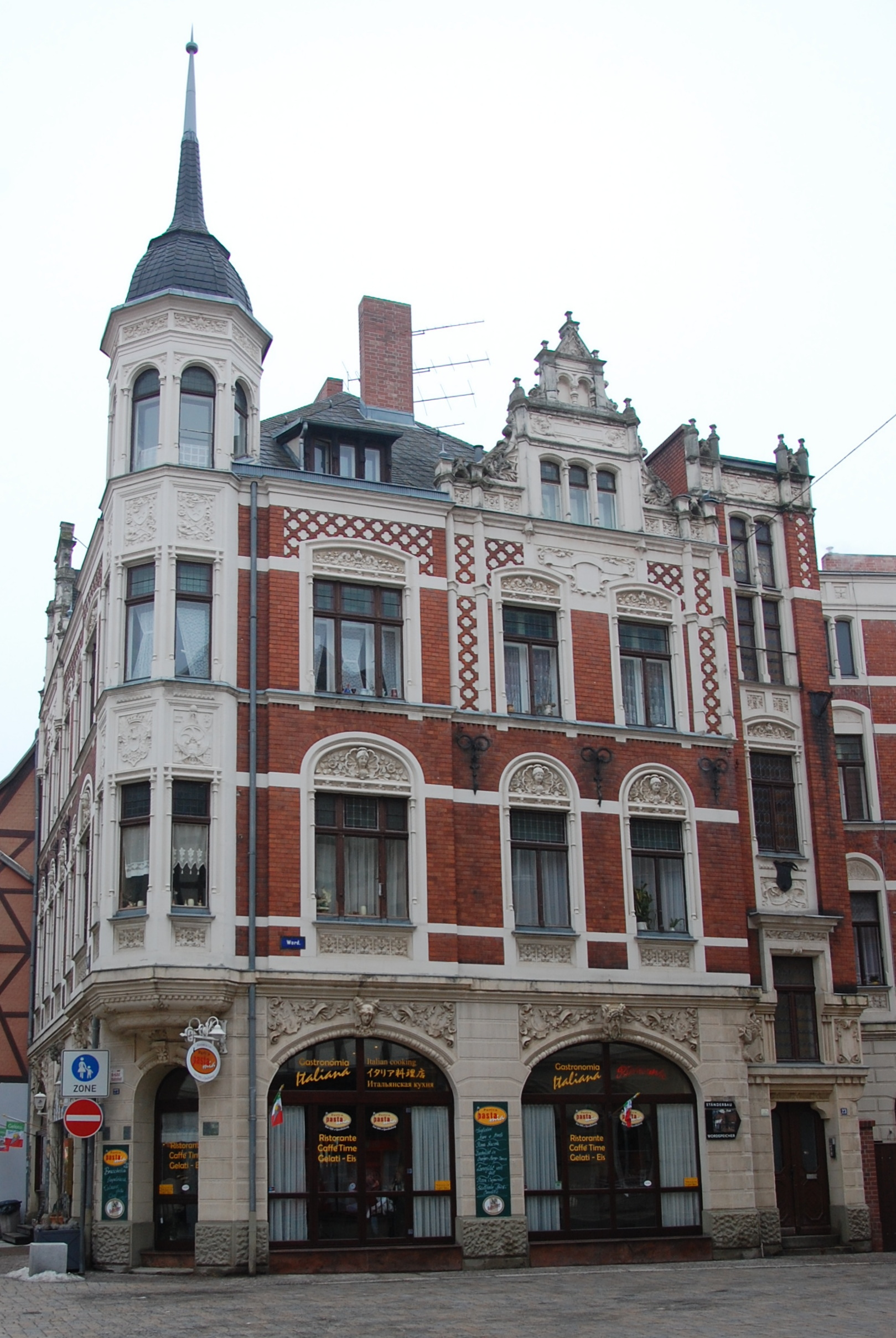 Haus Steinbrücke 23 in Quedlinburg